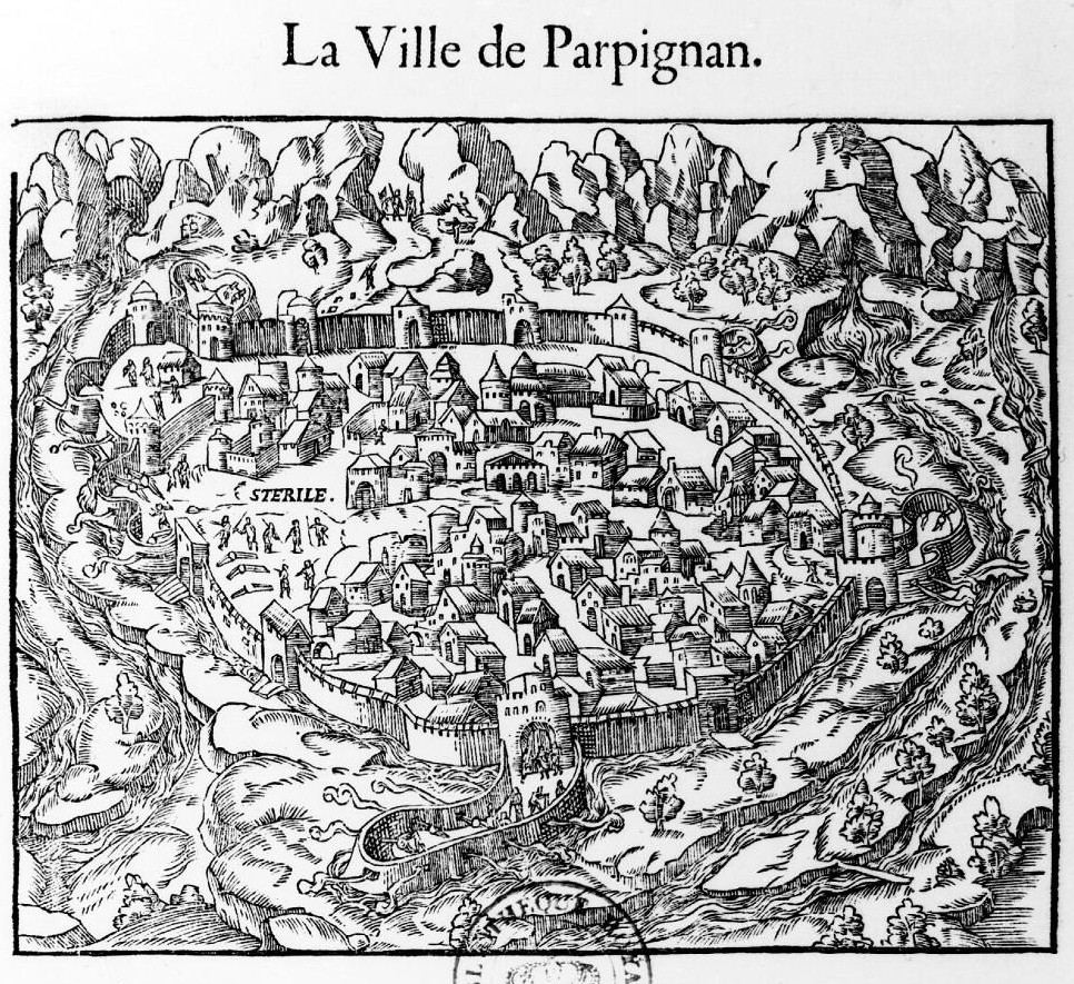 Carte de Perpignan issue de Epitome de la corographie d'Europe, illustré des pourtraictz des villes les plus renommées d'icelle (1563)